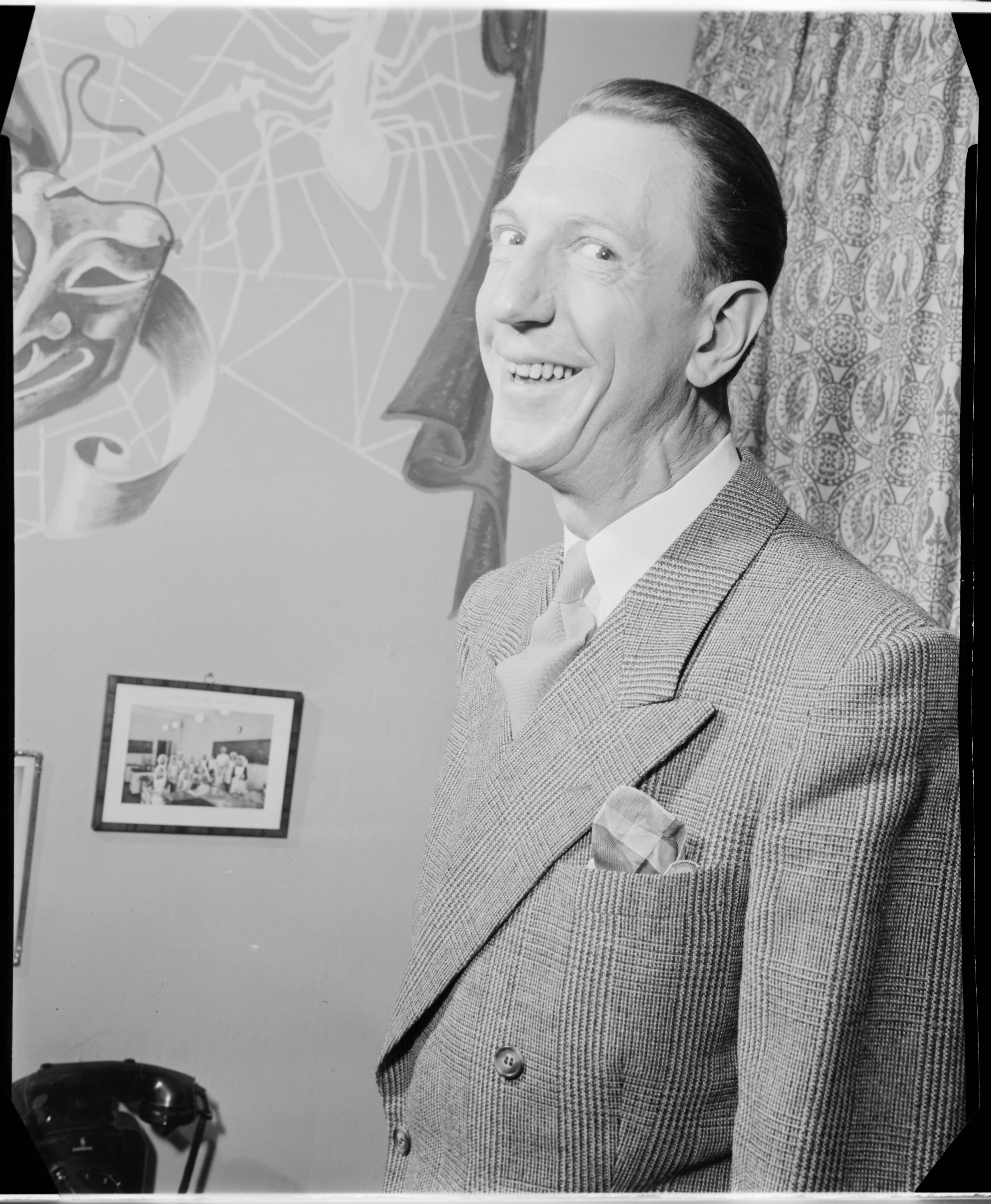 Bildet er hentet fra Arkivverket. Leif Juster, teaterdirektør. NÅ nr. 4, 1954 Arkivinstitusjon : Riksarkivet Arkivnavn : Billedbladet NÅ Sted : Norge, Ukjent, Ukjent, Ukjent Avbildet: Juster, Leif